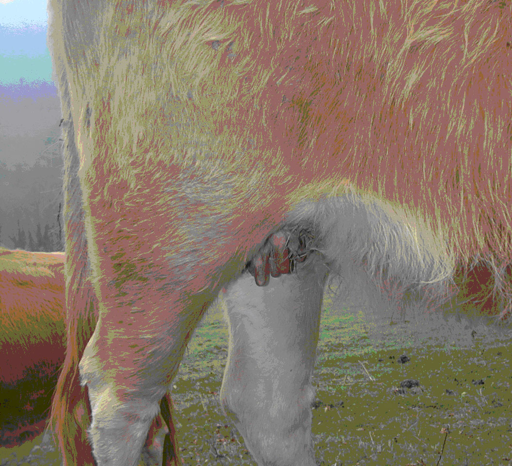 Betizu baten ohiko errapea